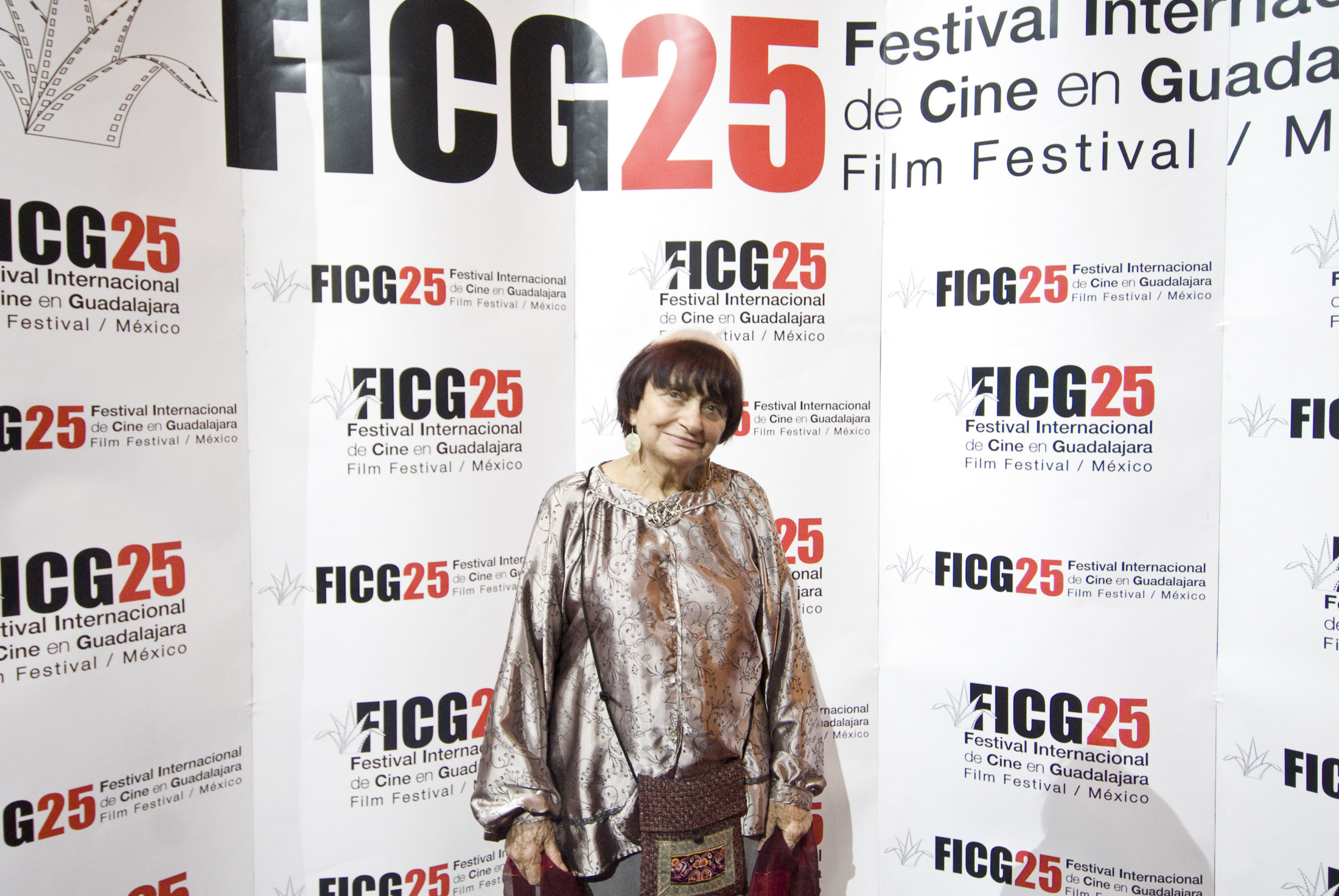 Agnés Vardá, en la alfombra roja de la entrega del Mayahuel de Plata. 18 de Marzo, 2010. Guadalajara, México. © Cortesía FICG25 / Michel Amado Carpio.